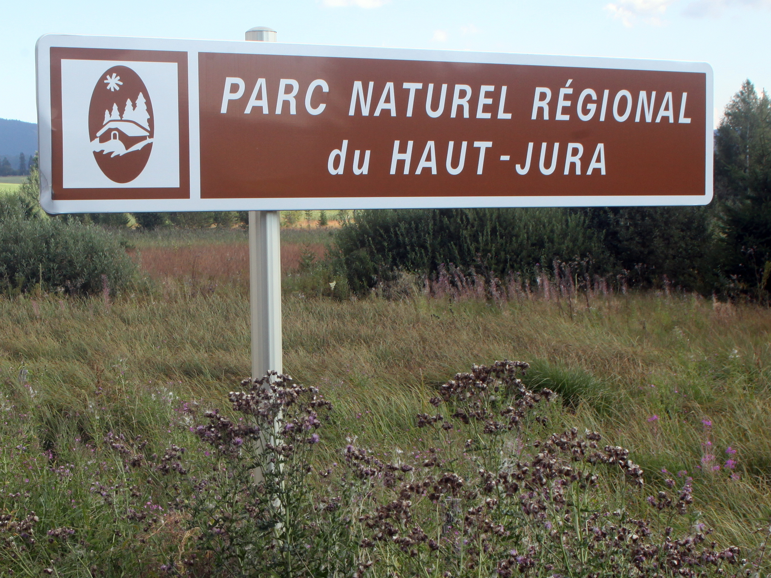 Panneau E33a d'entrée dans le Parc naturel régional du Haut-Jura.